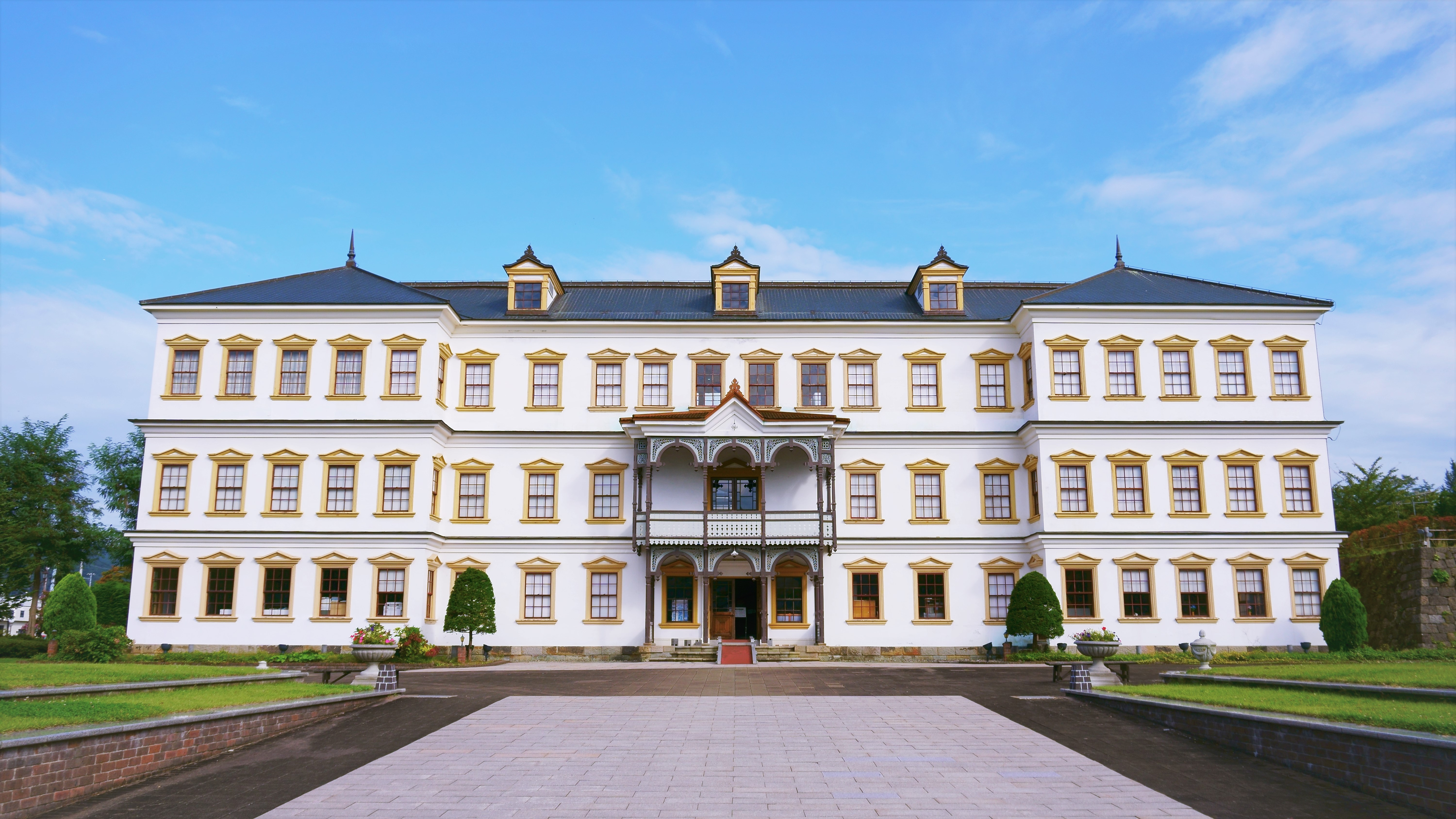 小坂鉱山事務所（秋田県小坂町）